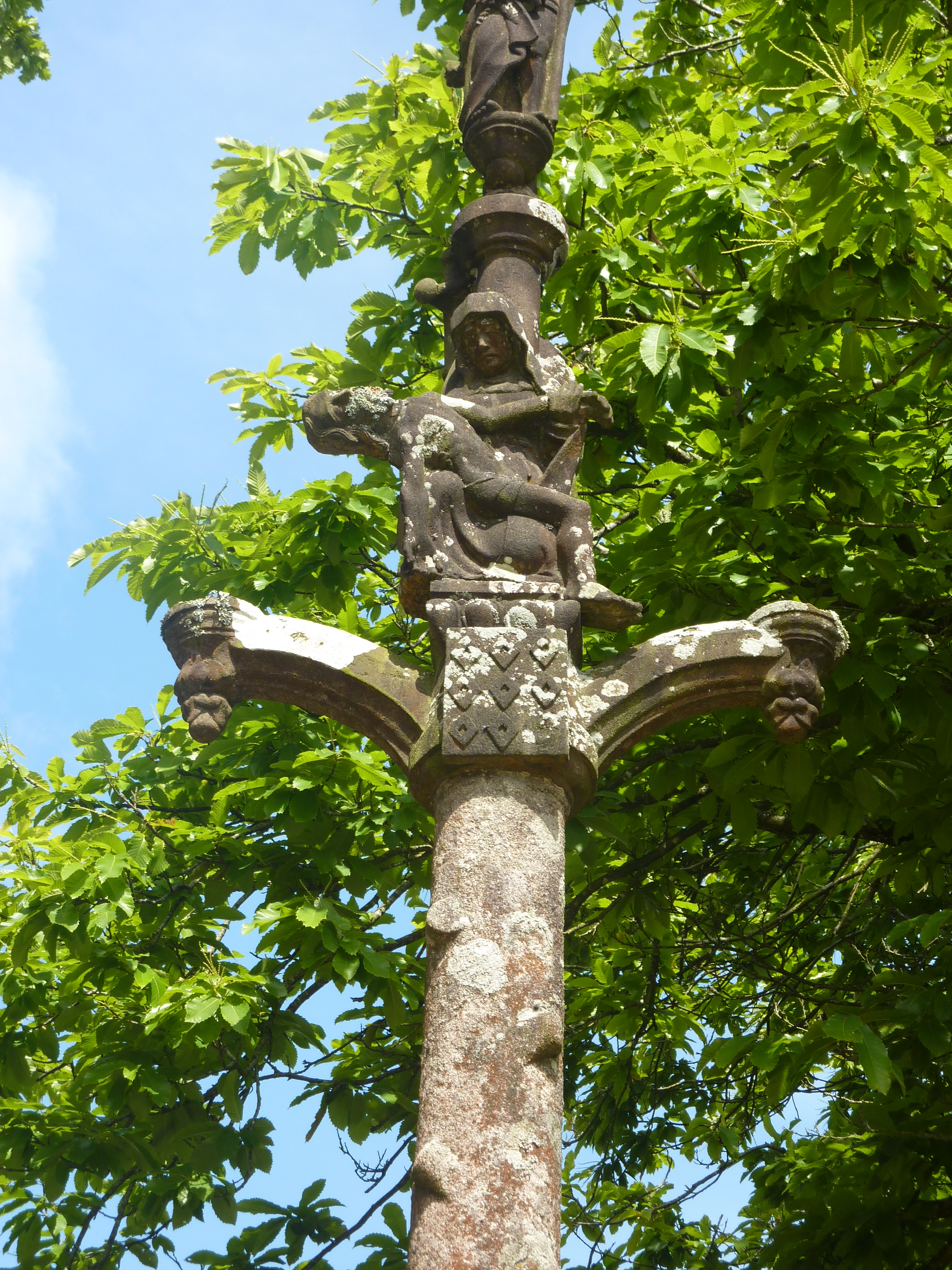 Saint-Divy (Finistère) : Autre calvaire dans l'enclos paroissial